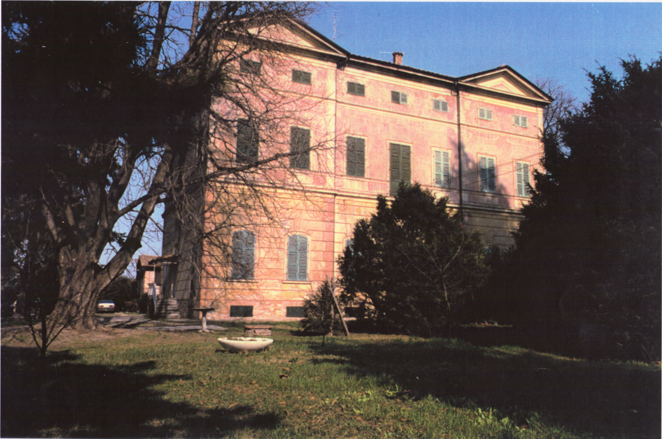 Villa Segre'